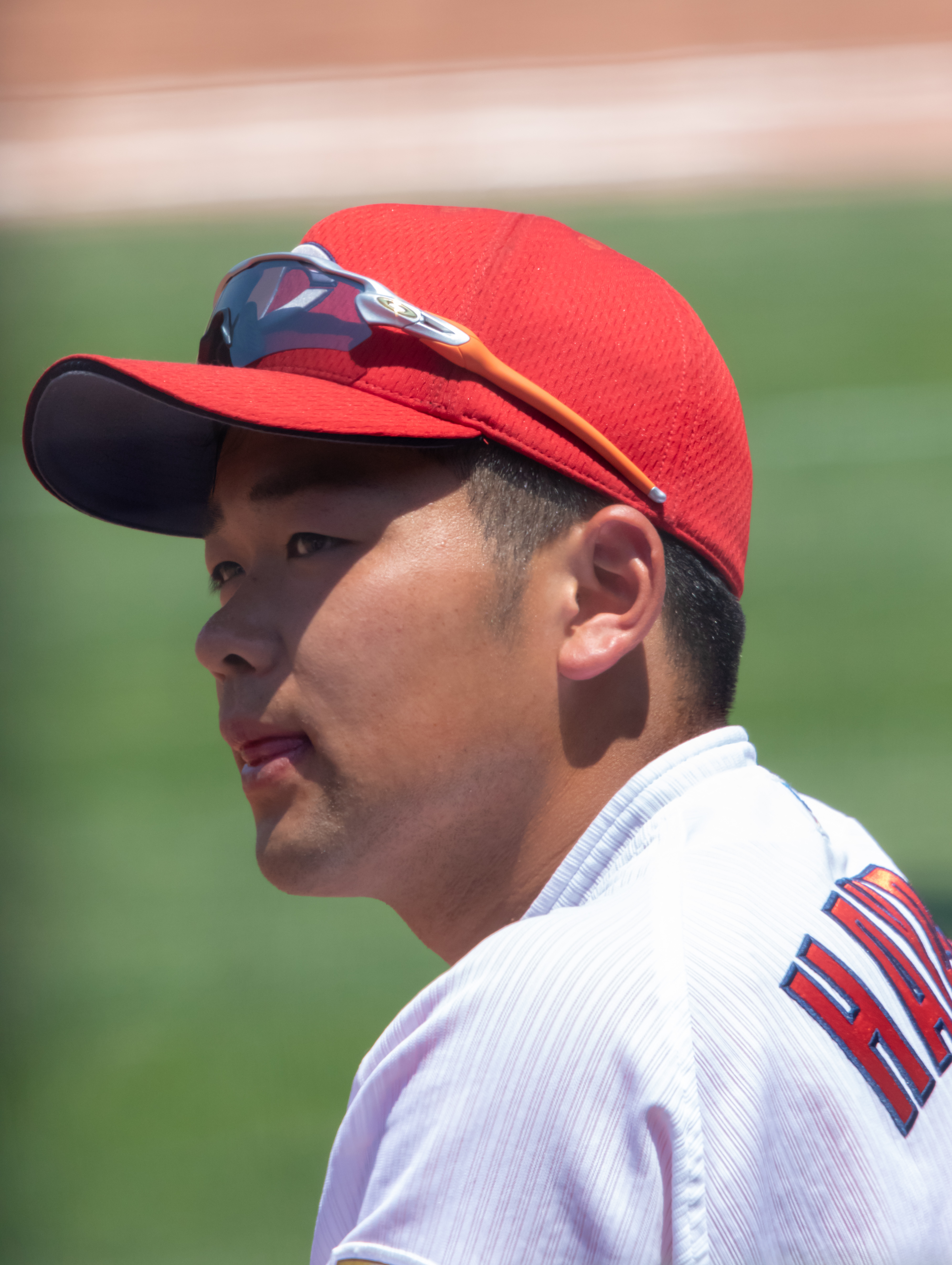 2019/5/24 マツダスタジアム